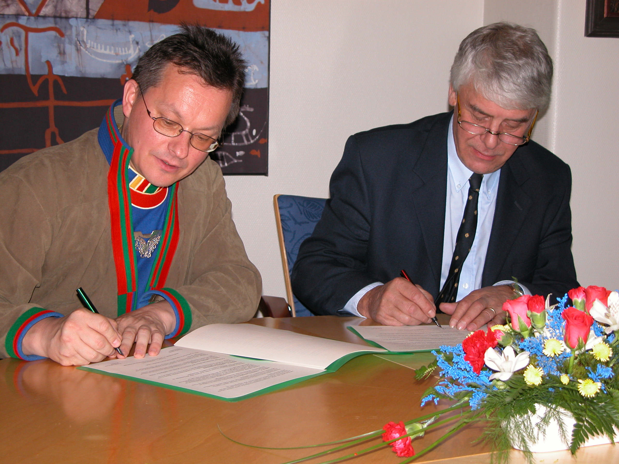 Sametingspresident Sven-Roald Nystø og fylkesordfører Ronald Rindestu undertegner i 2002 den første samarbeidsavtalen mellom Sametinget og andre offentlige virksomheter. Foto: Sametinget